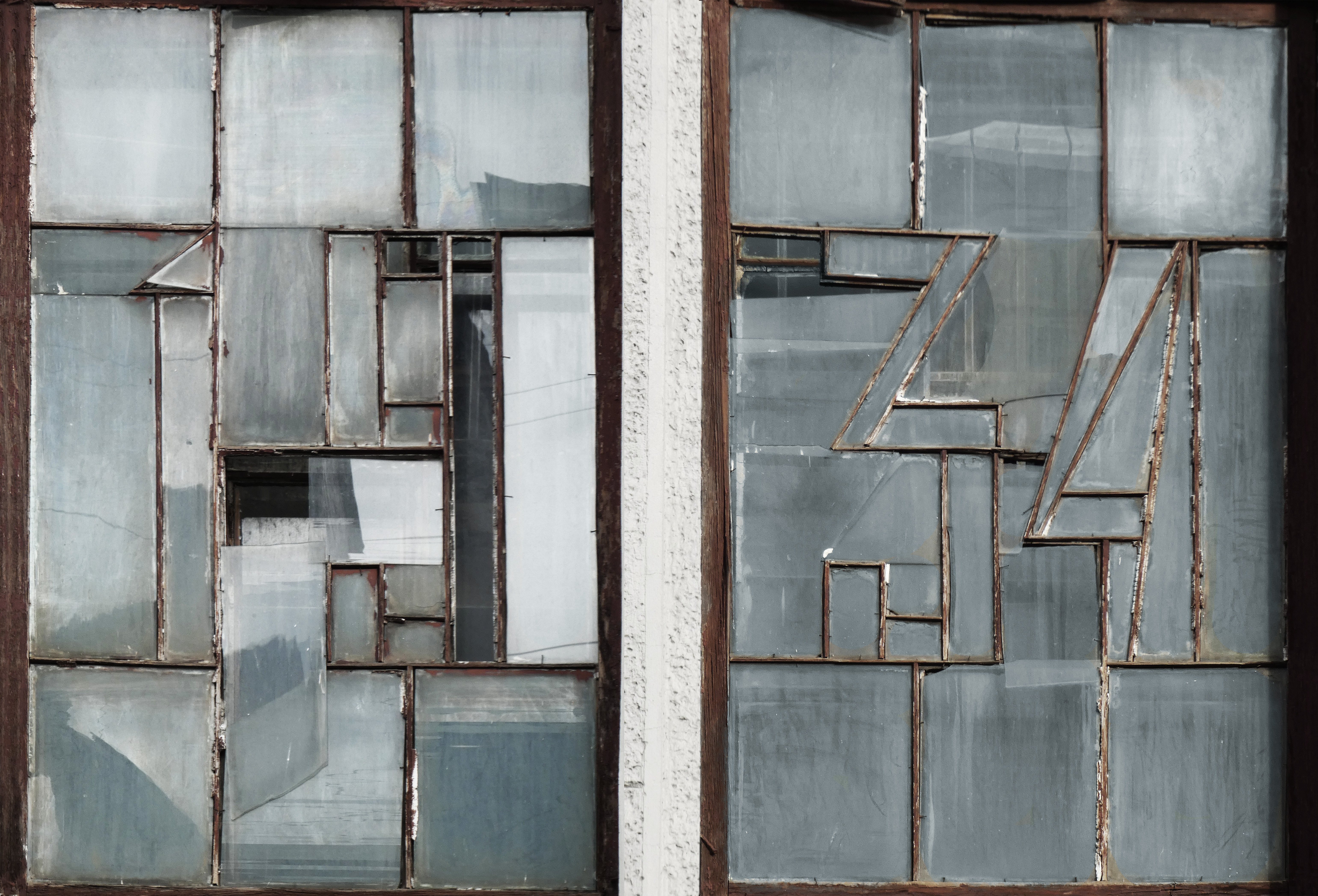 Будинок для співробітників комітету резервів при Раді праці та оборони. Вулиця Ярославів Вал, 20. Київ